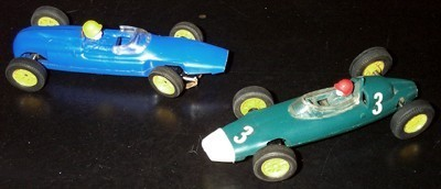 Bildbeschreibung: 2 Slotcars Cooper& BRM Quelle: selbst fotografiert Autor: srw Datum: 31. Oktober 2005